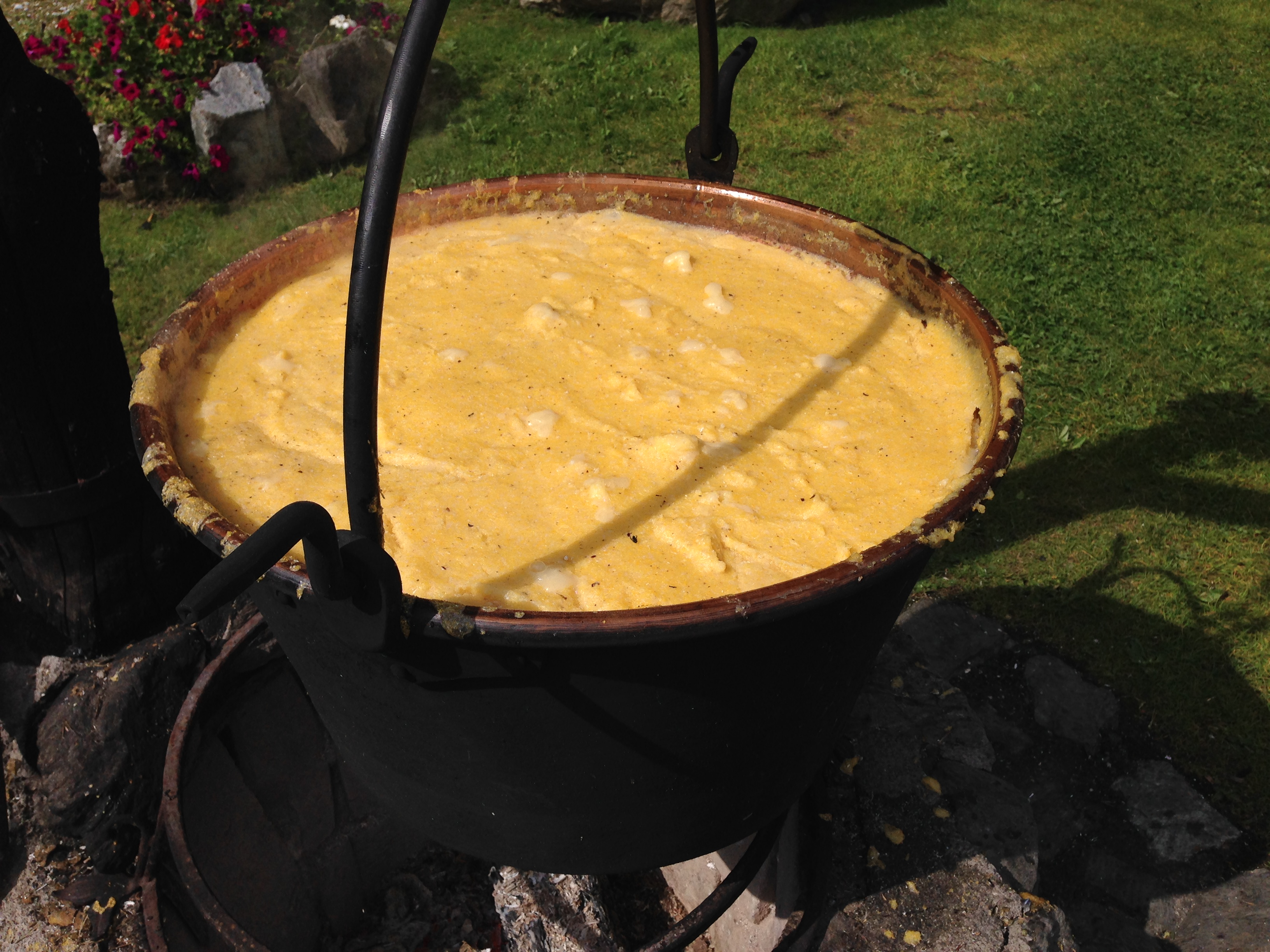 Cottura della polenta in paiolo